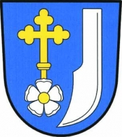 Dobrkovice, znak. V modrém štítě vpravo vyniká ze stříbrné růže se zlatým semeníkem zlatý jetelovitě zakončený procesní kříž, vlevo stříbrné krojidlo.